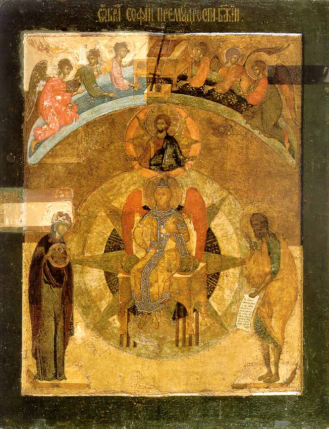 София Премудрость Божия. Икона двусторонняя запрестольная. На обороте - Распятие Москва (?). Первая четверть XV века Дерево, темпера. Размер - 69 х 54,5 см. Раскрыта частично. Запись XIX века. Московский Кремль. Благовещенский собор. Московский Кремль. (№ 480 соб.). This is the oldest of the "Holy Wisdom" icons of the "Novgorod type", from the Annunciation Cathedral in Moscow, dated to the first quarter of the 15th century.